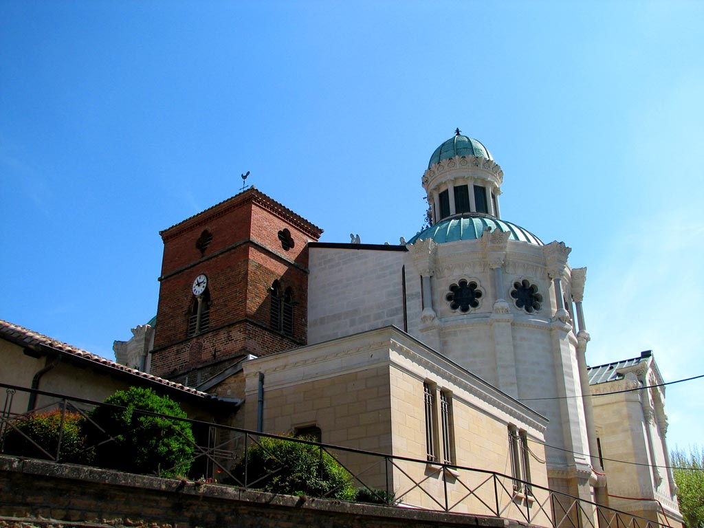 Ars-sur-Formans, Basilique de Saint Jean-Marie Vianney